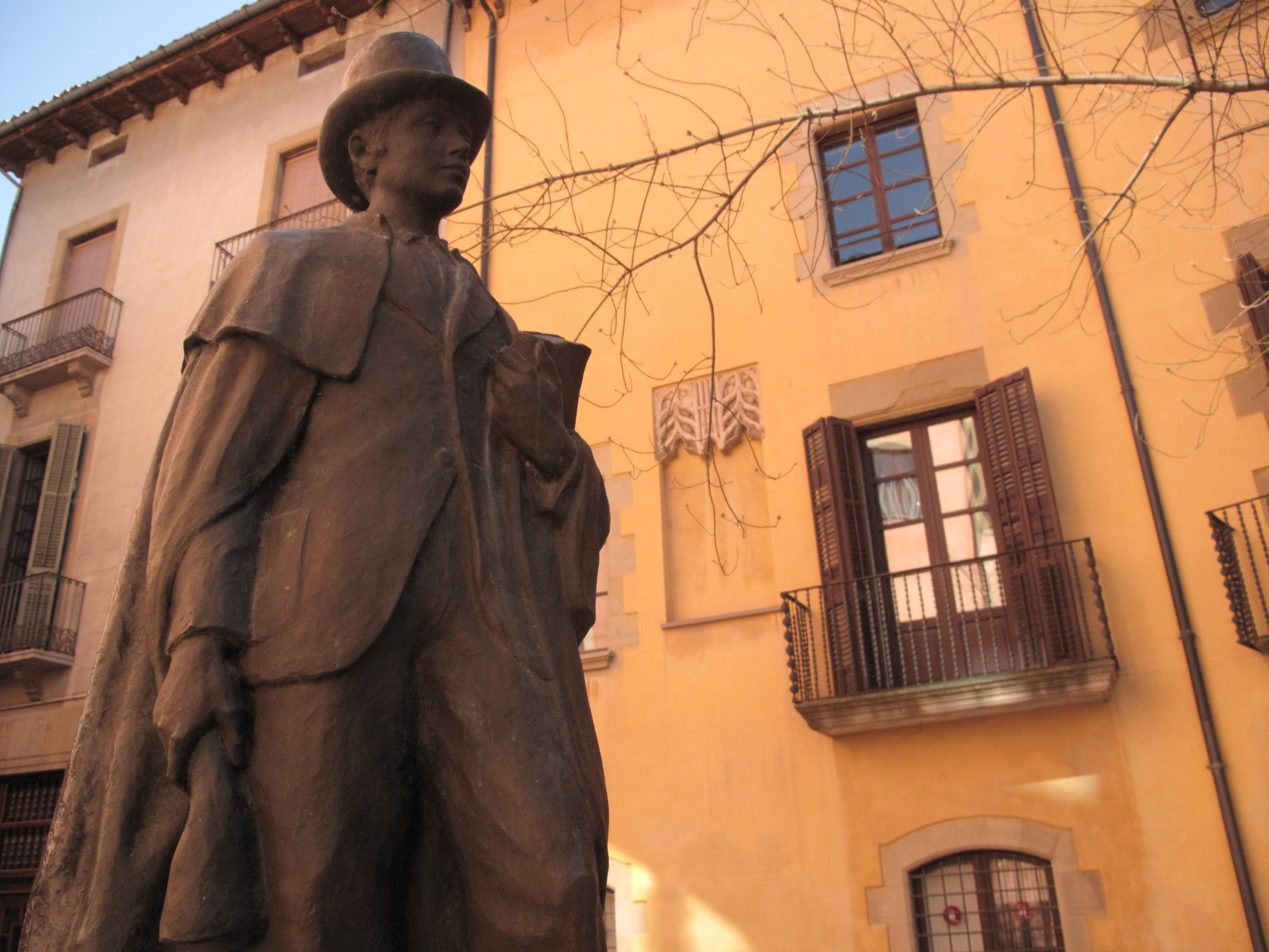 Casa Balmes, o Bojons (Vic)